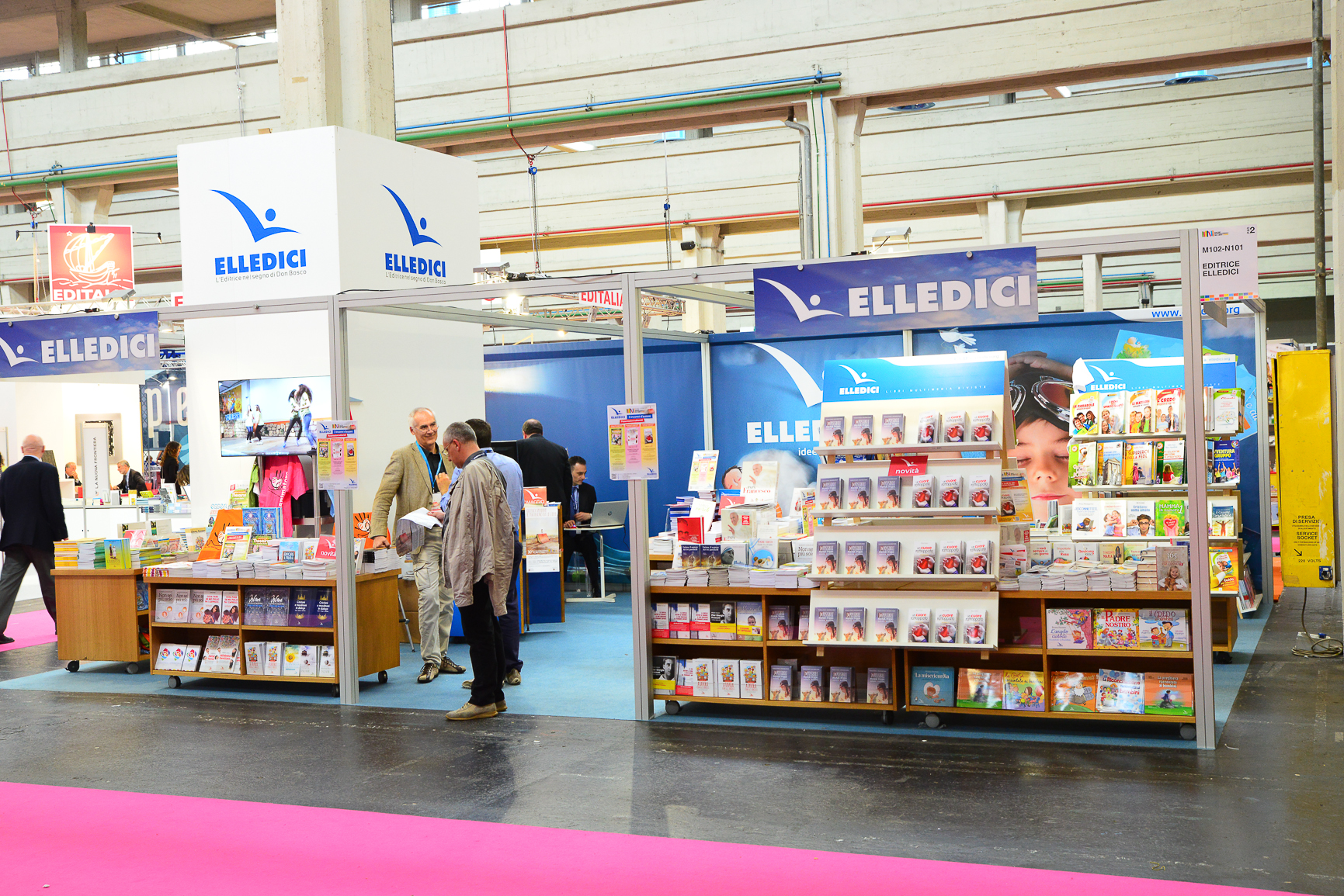 Elledici al Salone Internazionale del libro di Torino